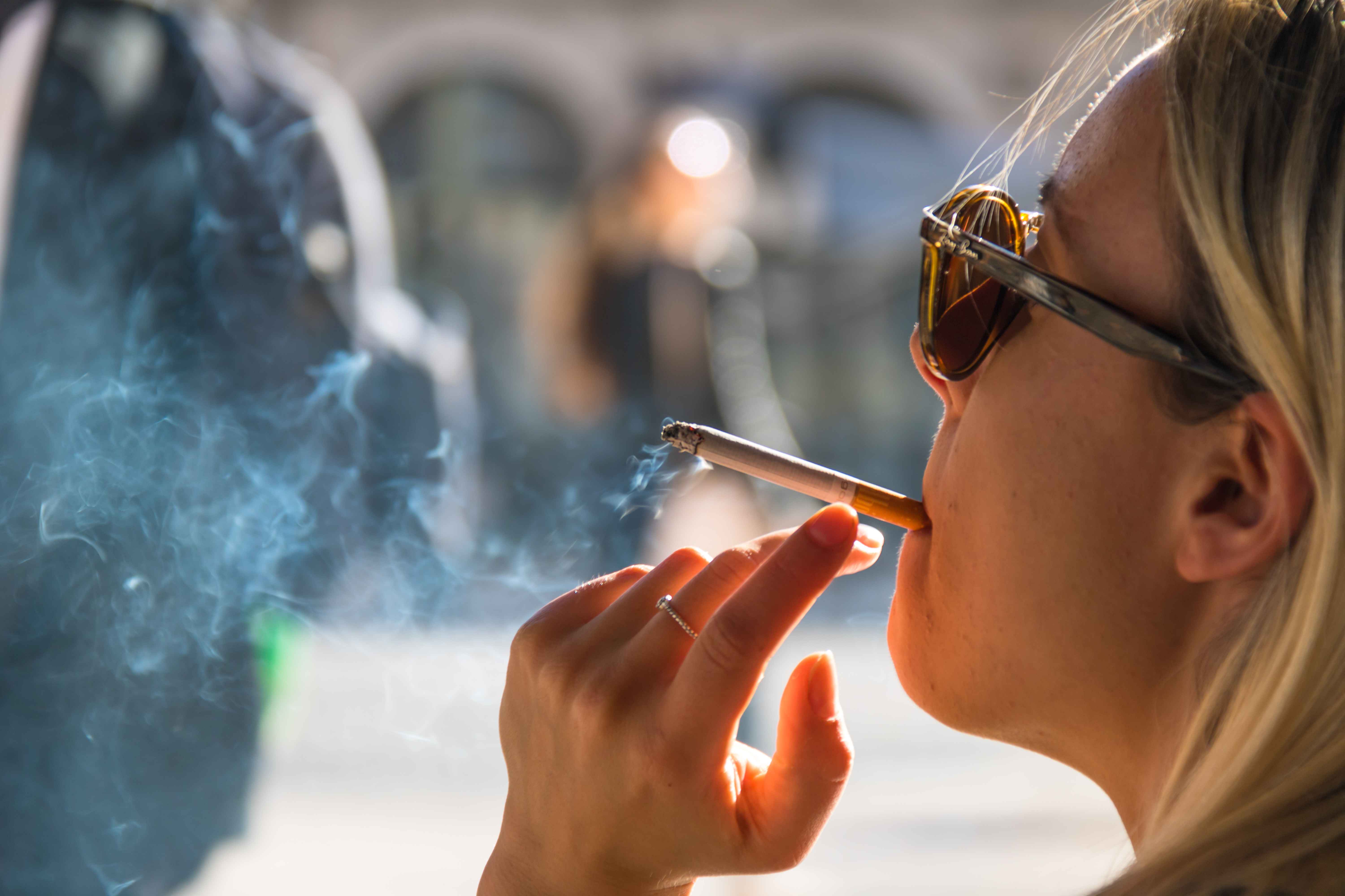 Smoke